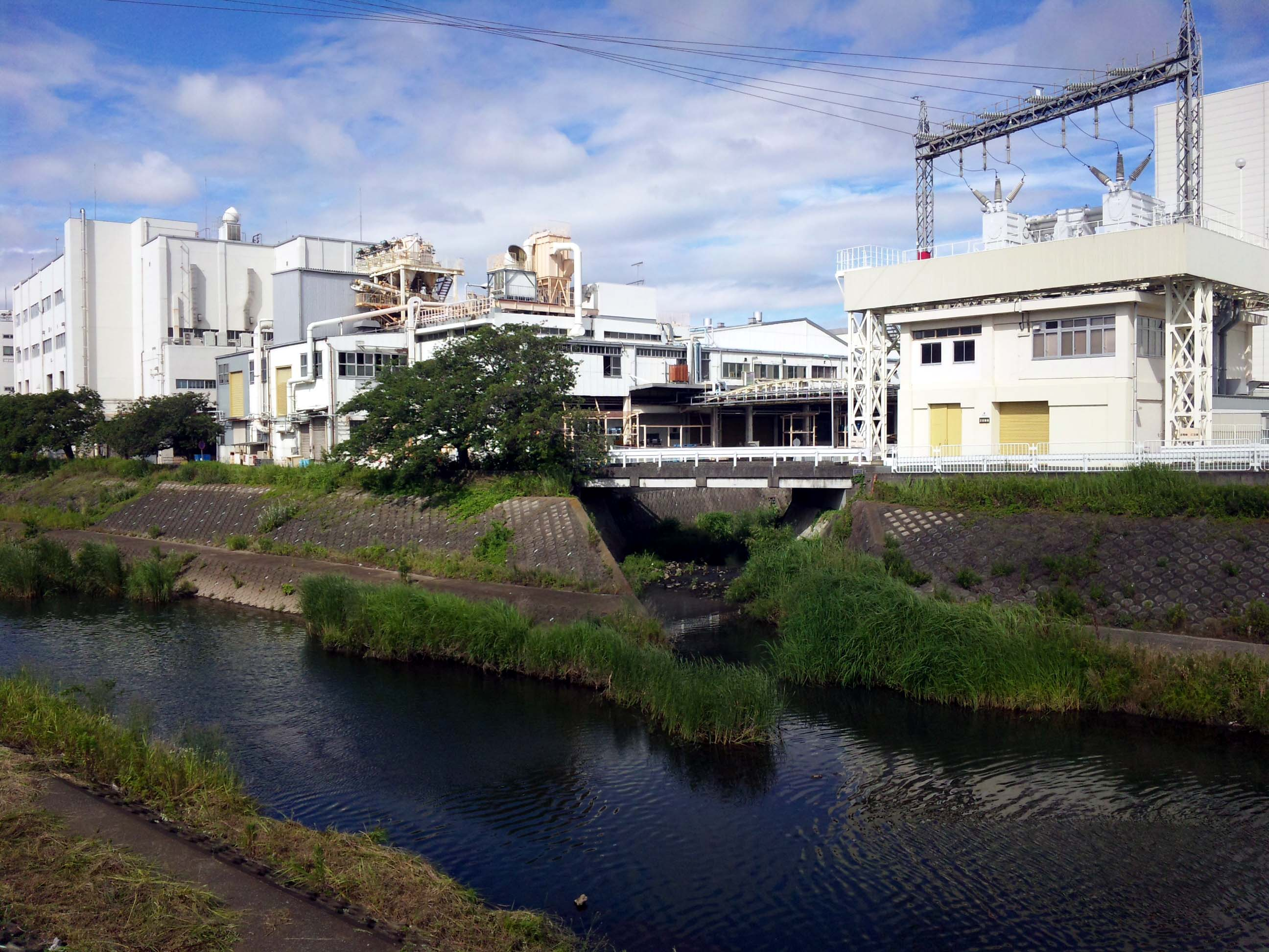 柏尾川と舞岡川の合流地点。背後はブリジストン戸塚工場。NTTドコモSH-01Bにて撮影